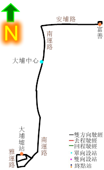 中文（香港）: 港鐵巴士K17線的走線圖